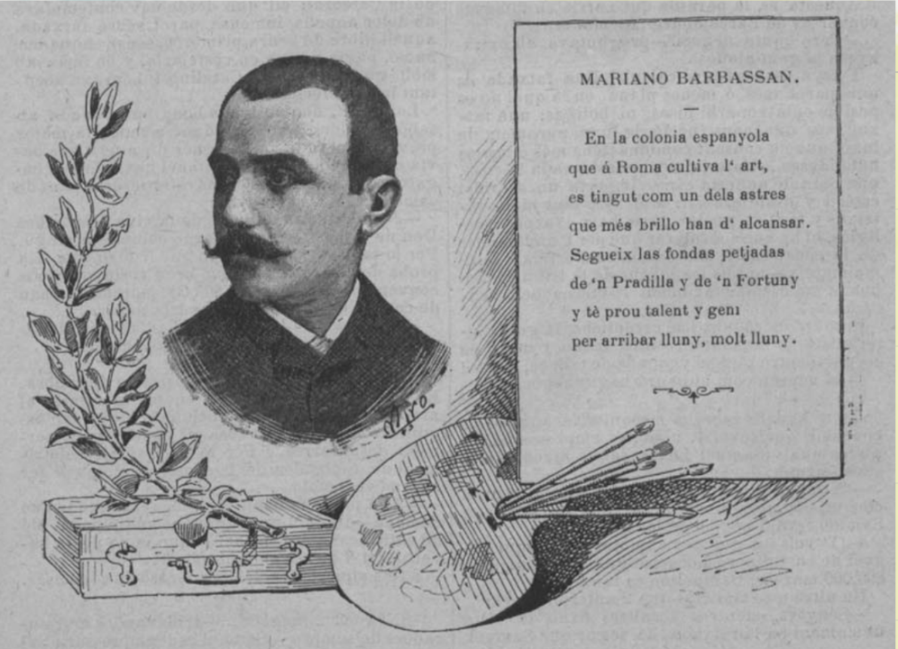 "Cap de Brot" publicat a L'Esquella de la Torratxa l'any 1891.